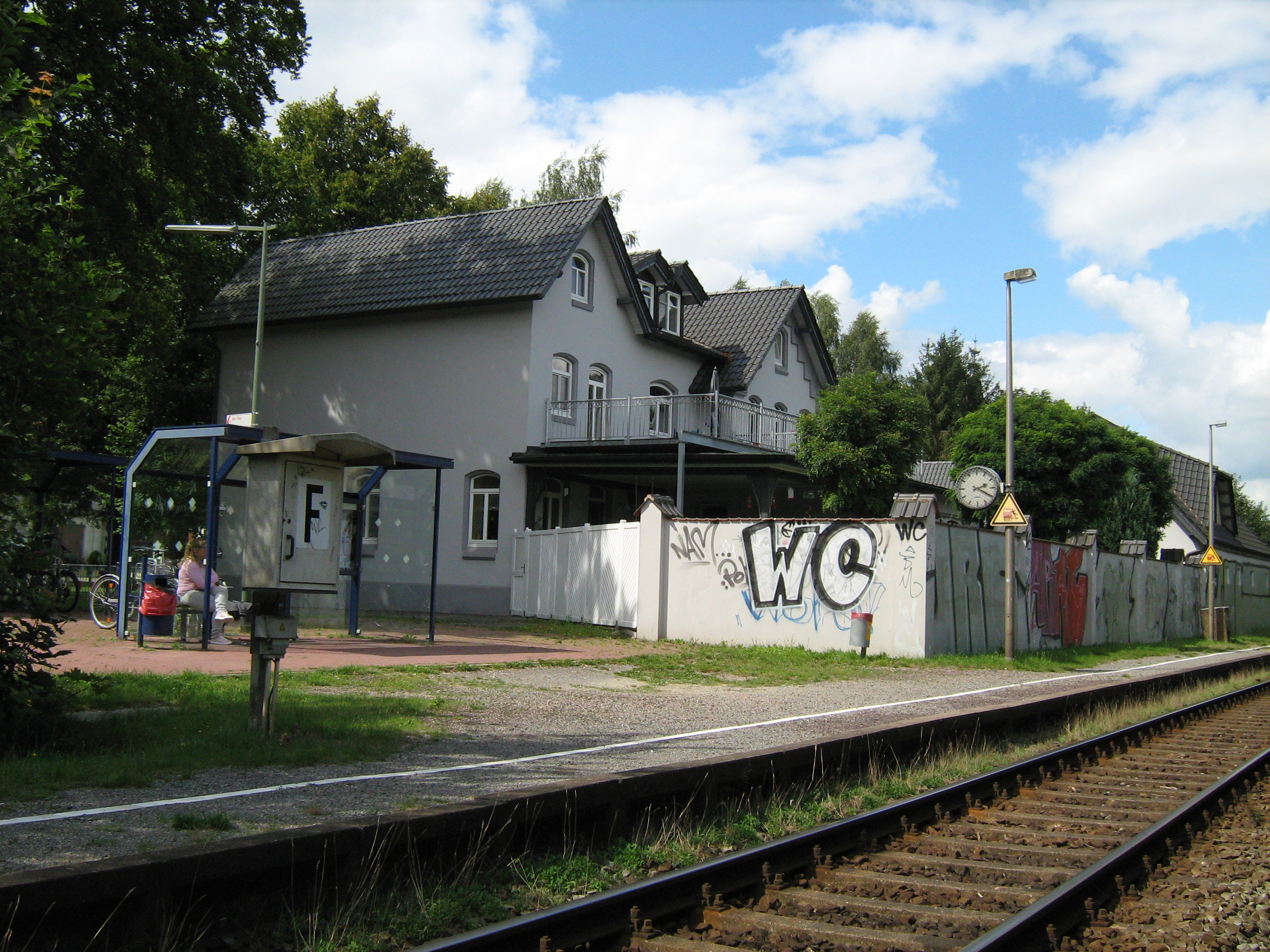 ehemaliger Bahnhof und jetziger Bahnsteig Halen (Lotte)